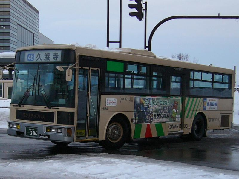 登録番号 青森200か・306 弘南バス弘前営業所所属 車番10407-3 2006年1月1日 弘前駅前にて撮影 撮影者 Tokatsu kokubu